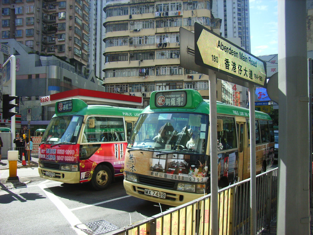 香港島南區香港仔大道